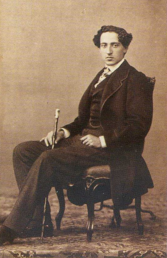 Fernando Fdez de Velasco, Altobelli y Molins, circa 1860. Colección Pedro Antonio de Alarcón. Museo Lázaro Galdiano